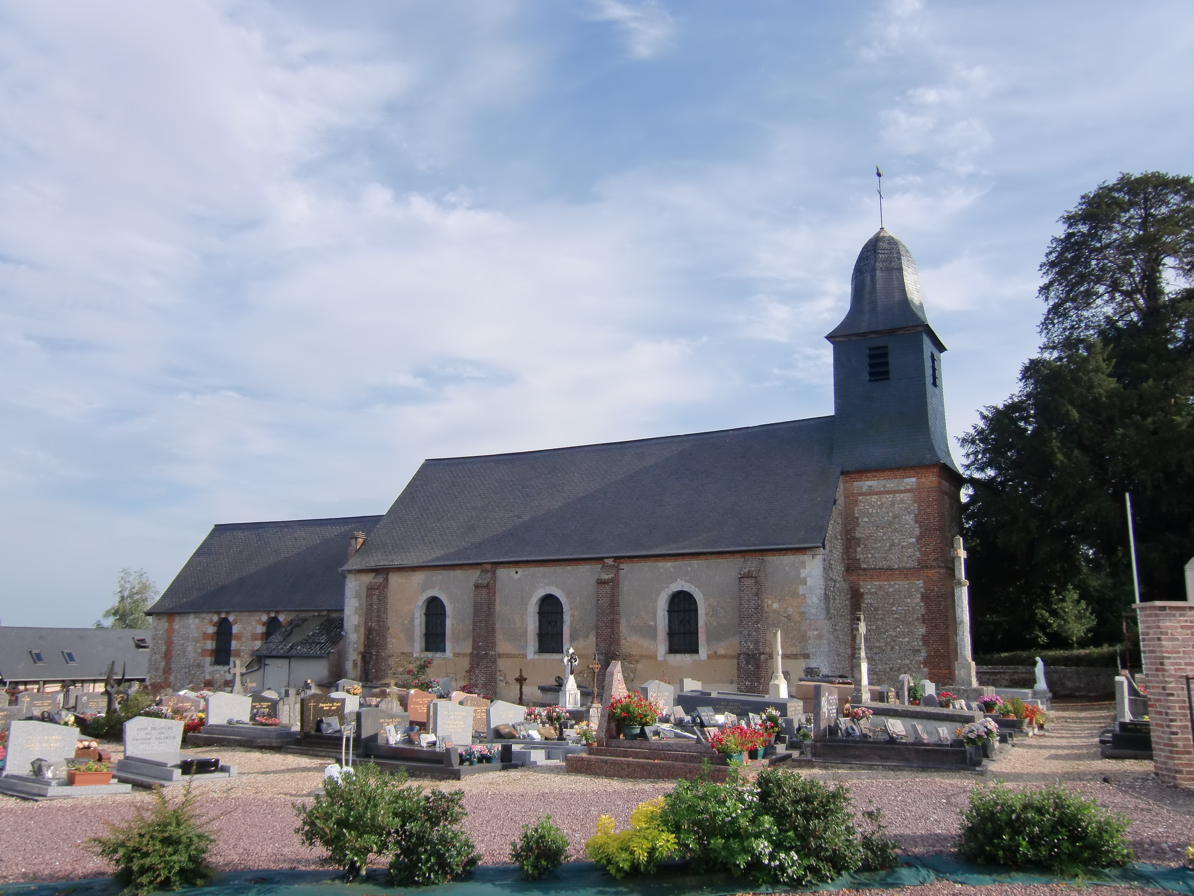 église de Manneville-sur-Risle (Eure, Normandie, France)